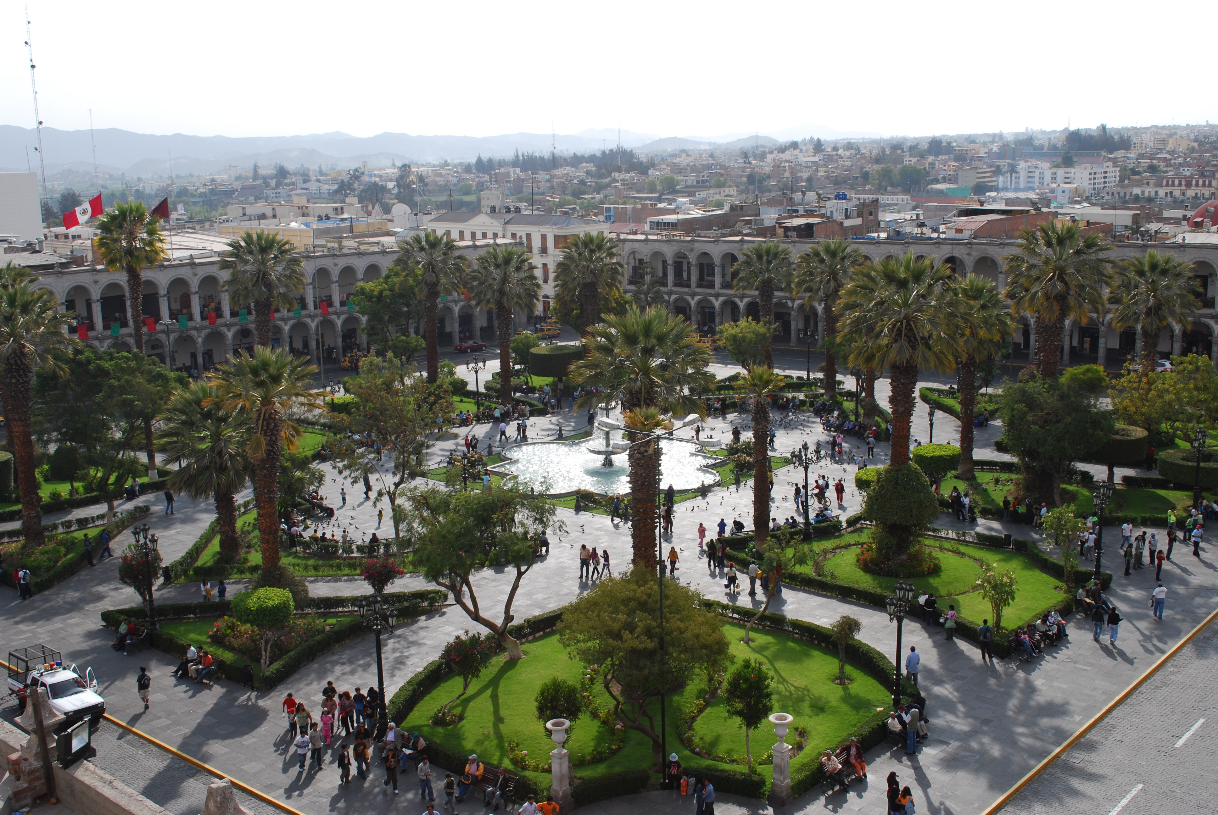 AREQUIPA